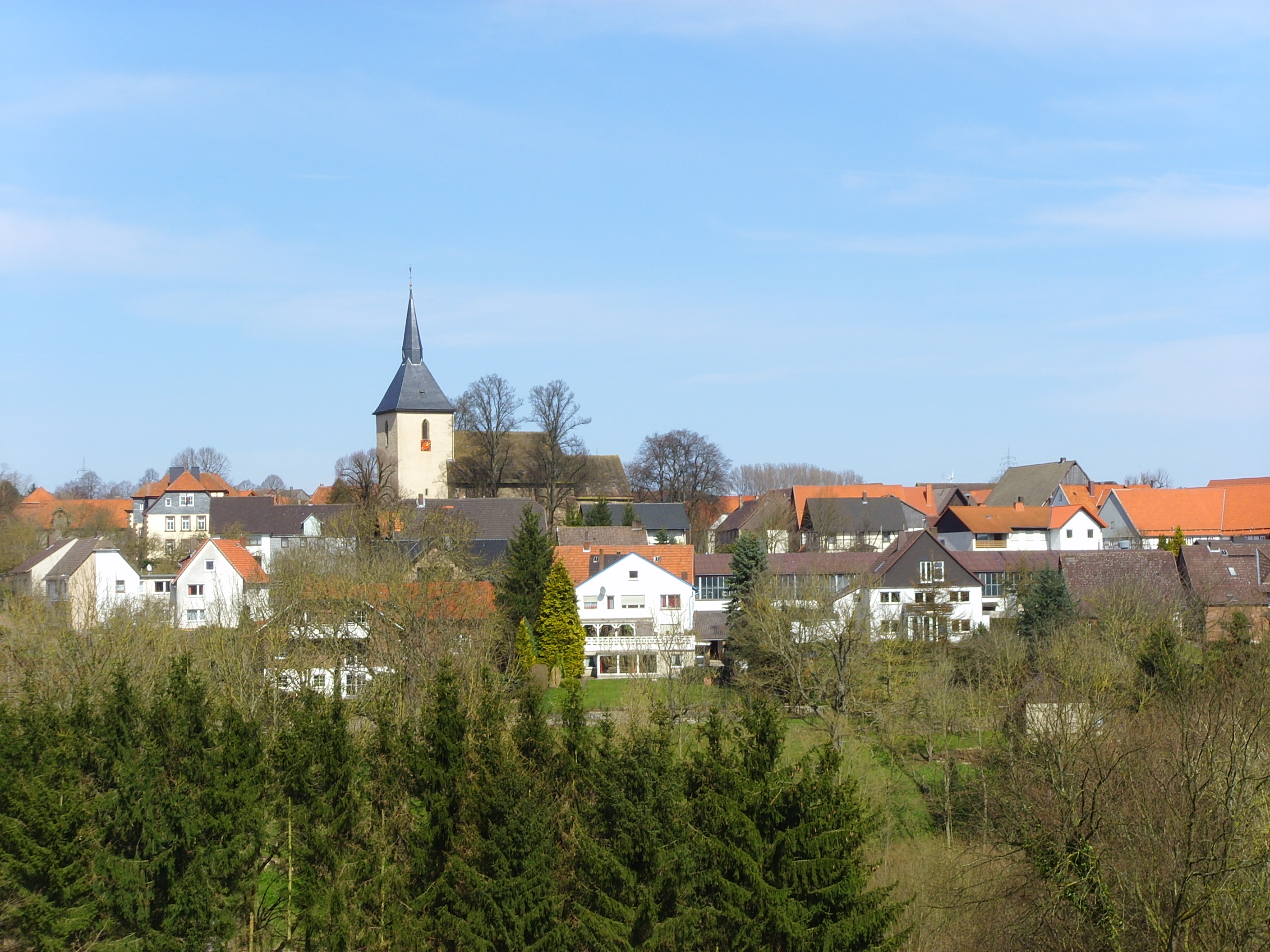 Ansicht aus südwestlicher Richtung, Borgholz, Borgentreich, im März 2008.